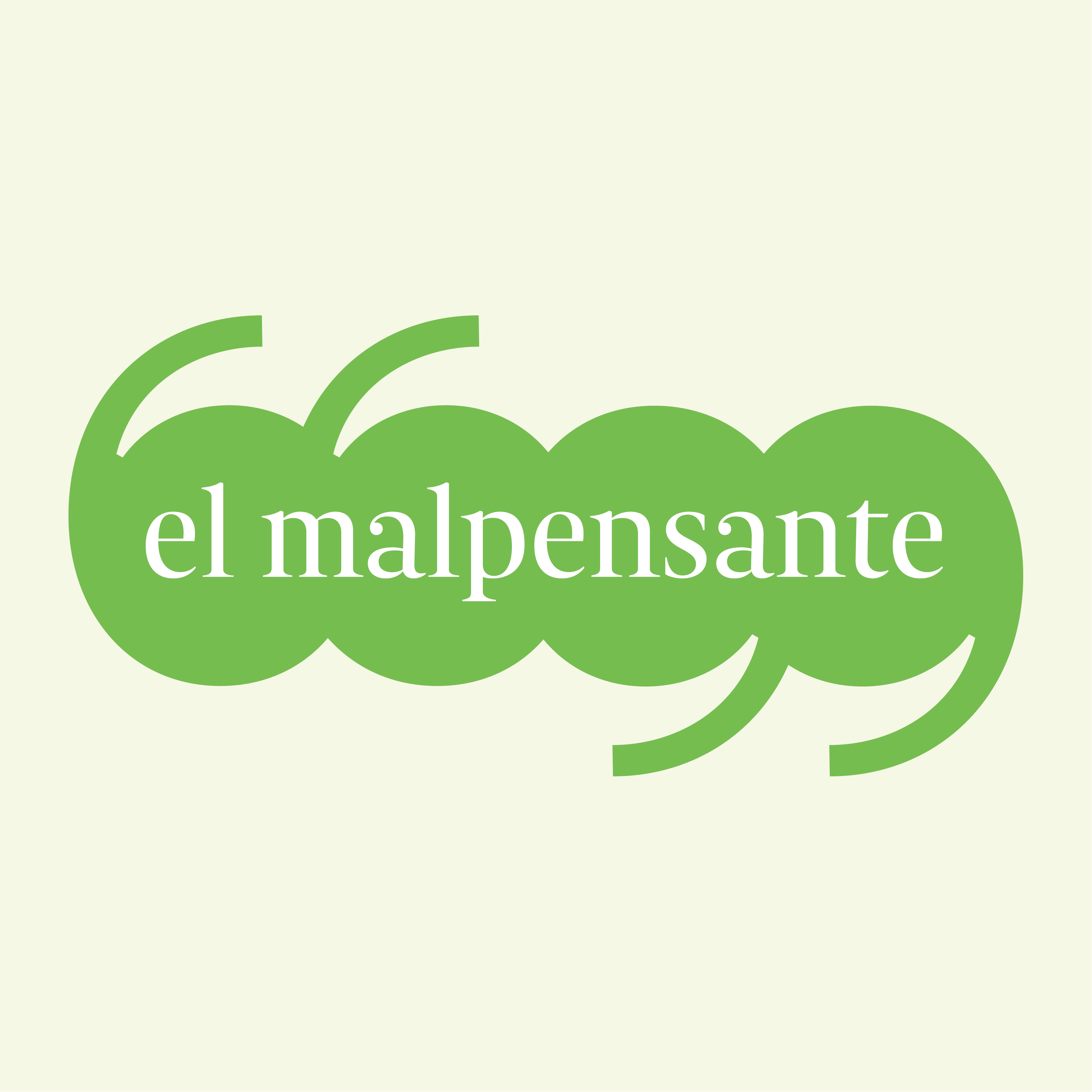 Lodo de El Malpensante